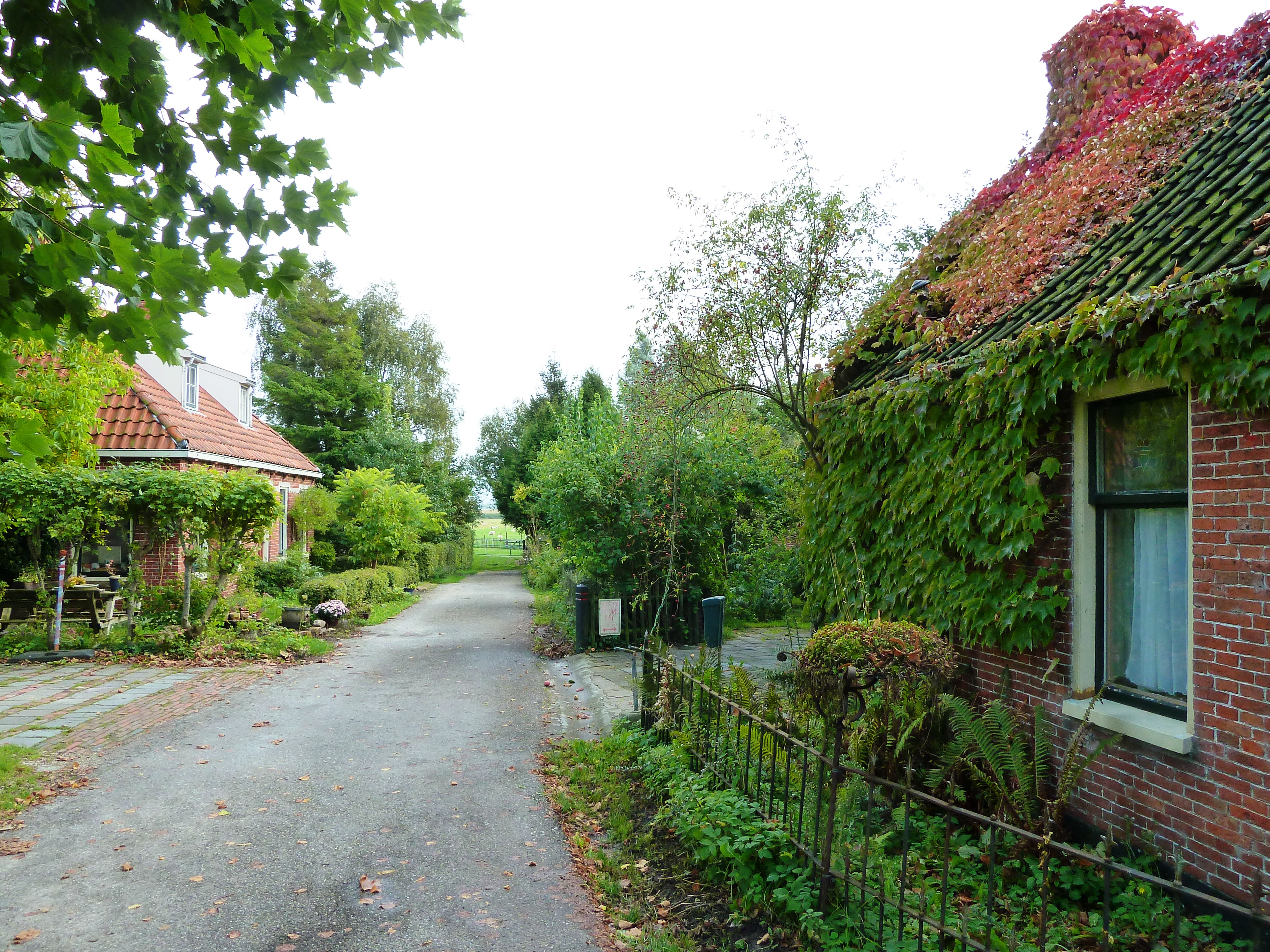 Straatgezicht in de straat Burum in het Groningse dorp Warfhuizen.